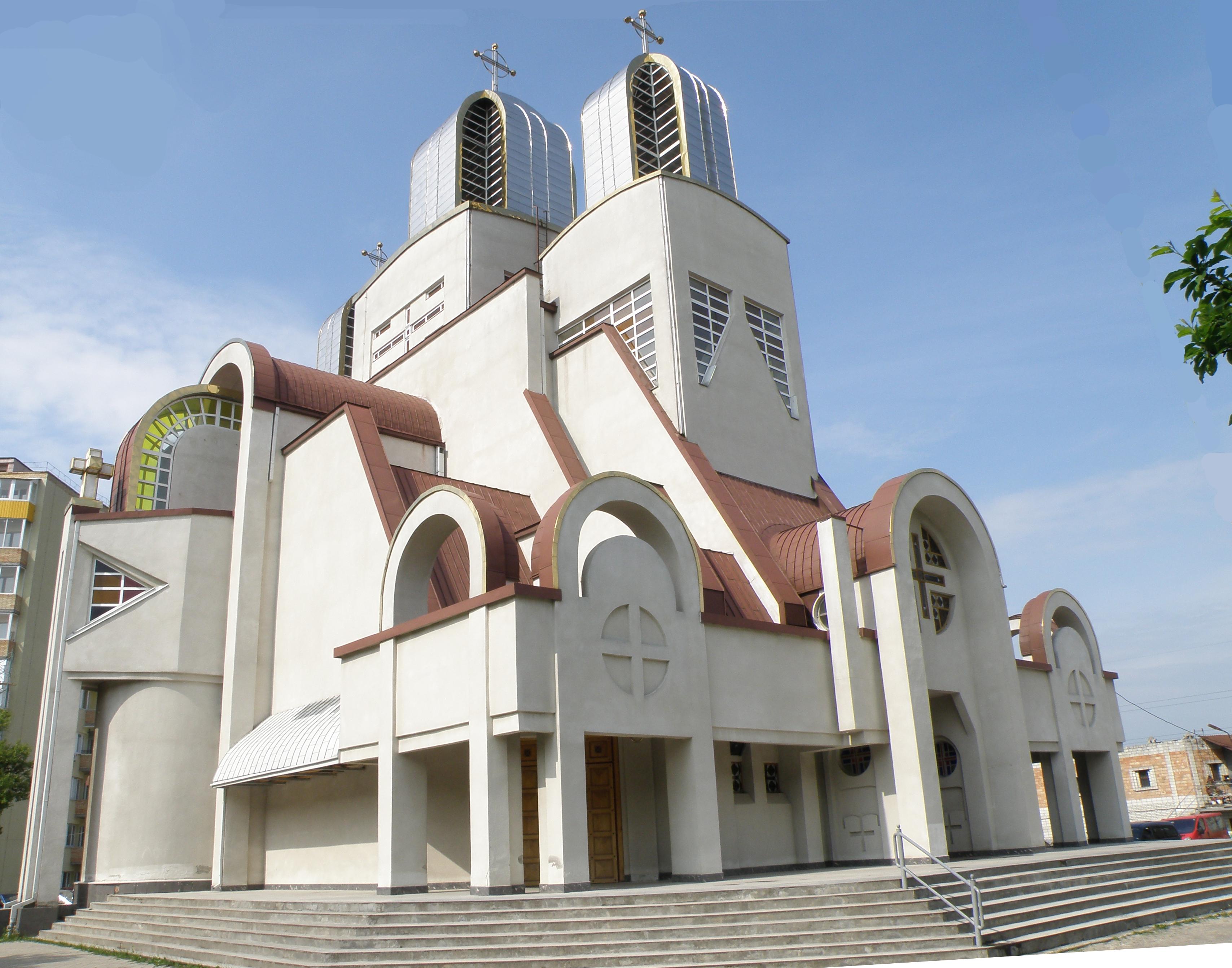 Церква Положення Пояса Пресвятої Богородиці